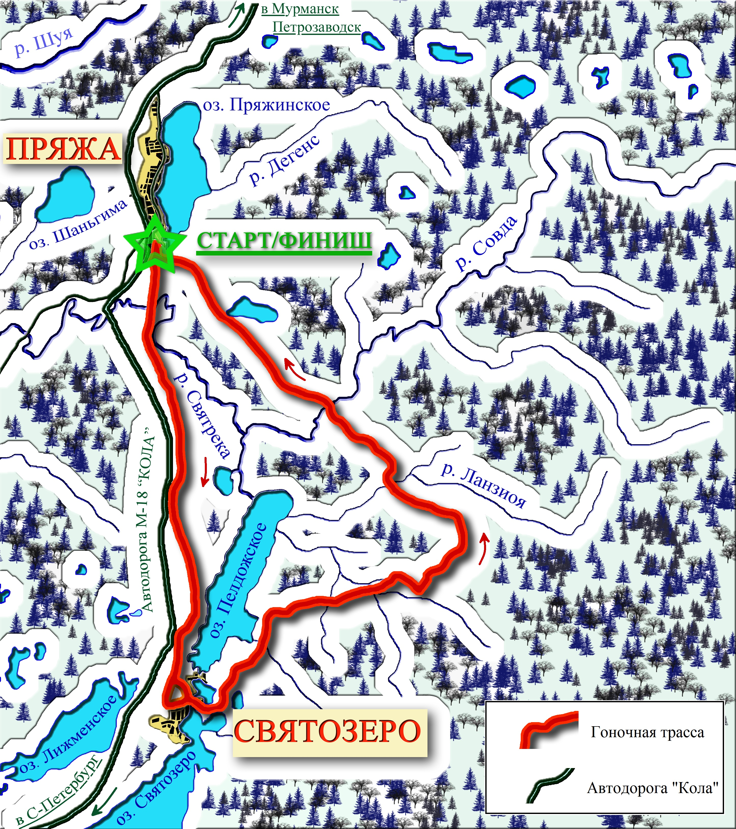 Схема трассы и района проведения гонок на собачьих упряжках "По земле Сампо"